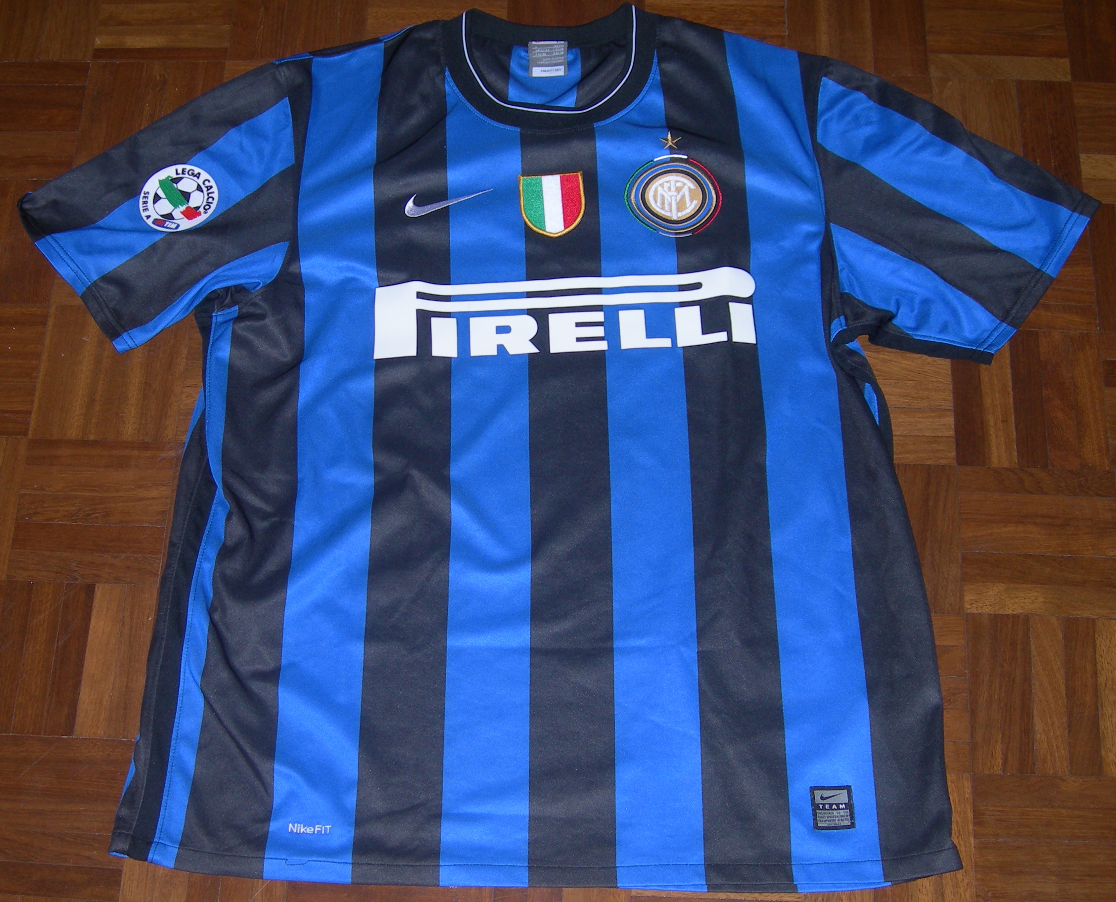 Foto della maglia dell'Inter 2009-2010